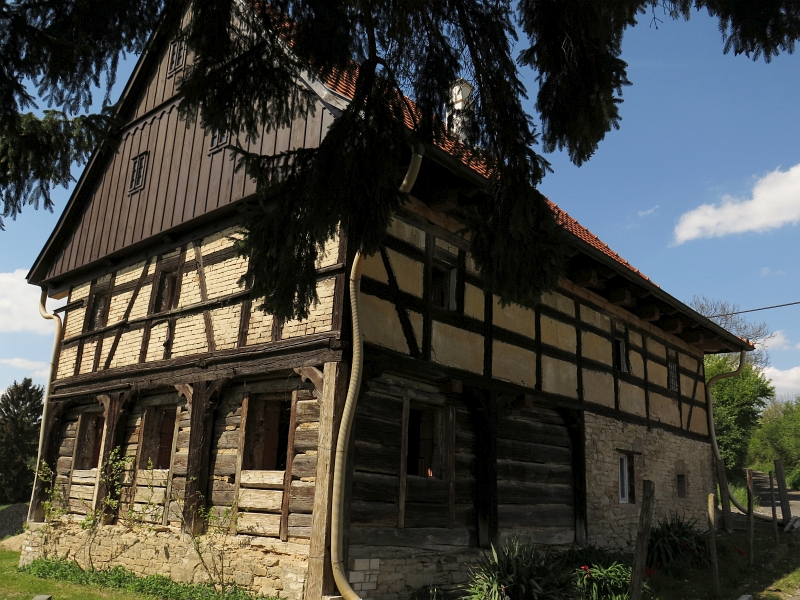 Usedlost čp. 17, Čakovice 17, Čakovice (Štětí).